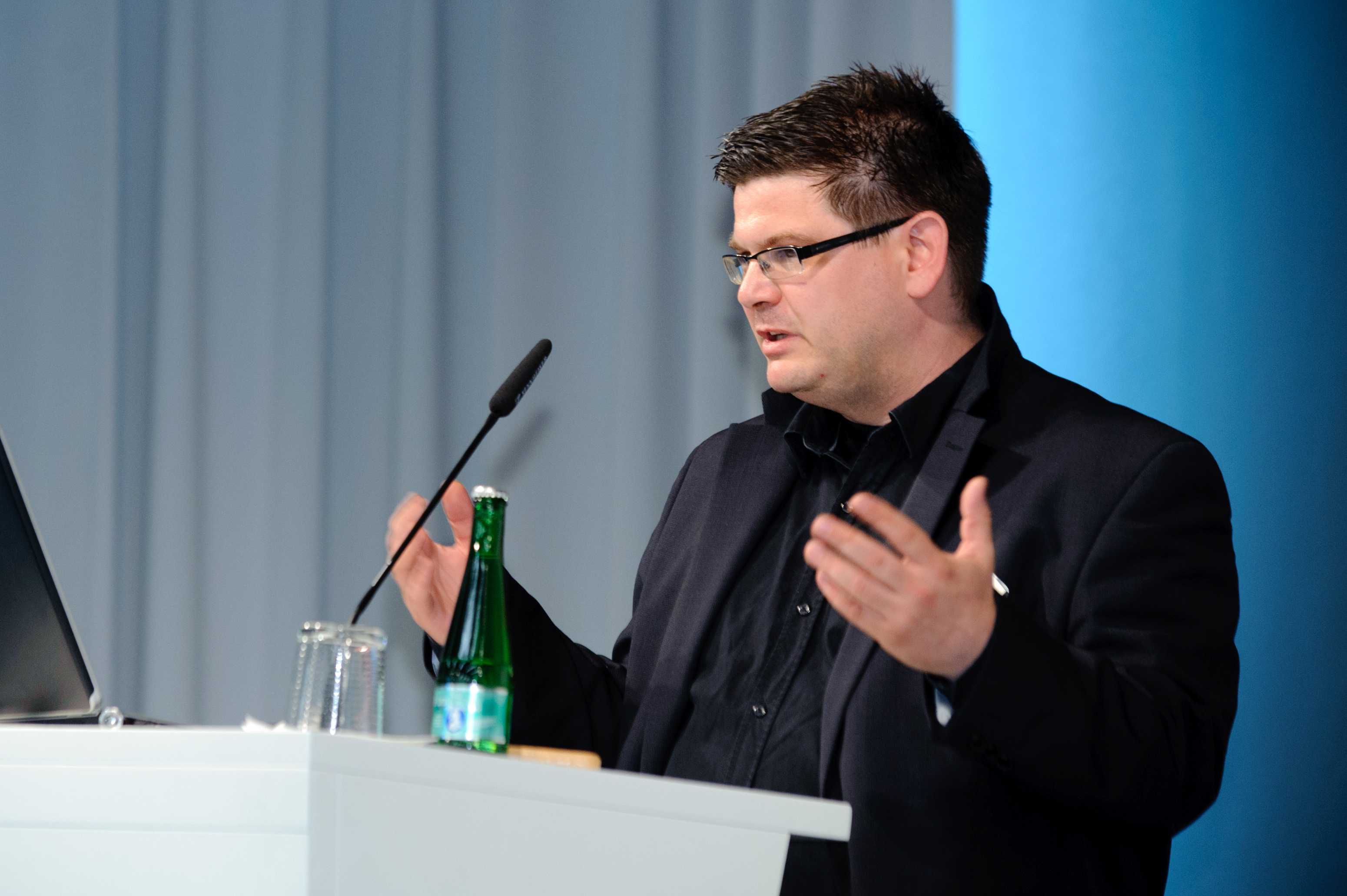 Andrej Holm (Inst. f. Soziologie, HU Berlin) Foto: Stephan Röhl